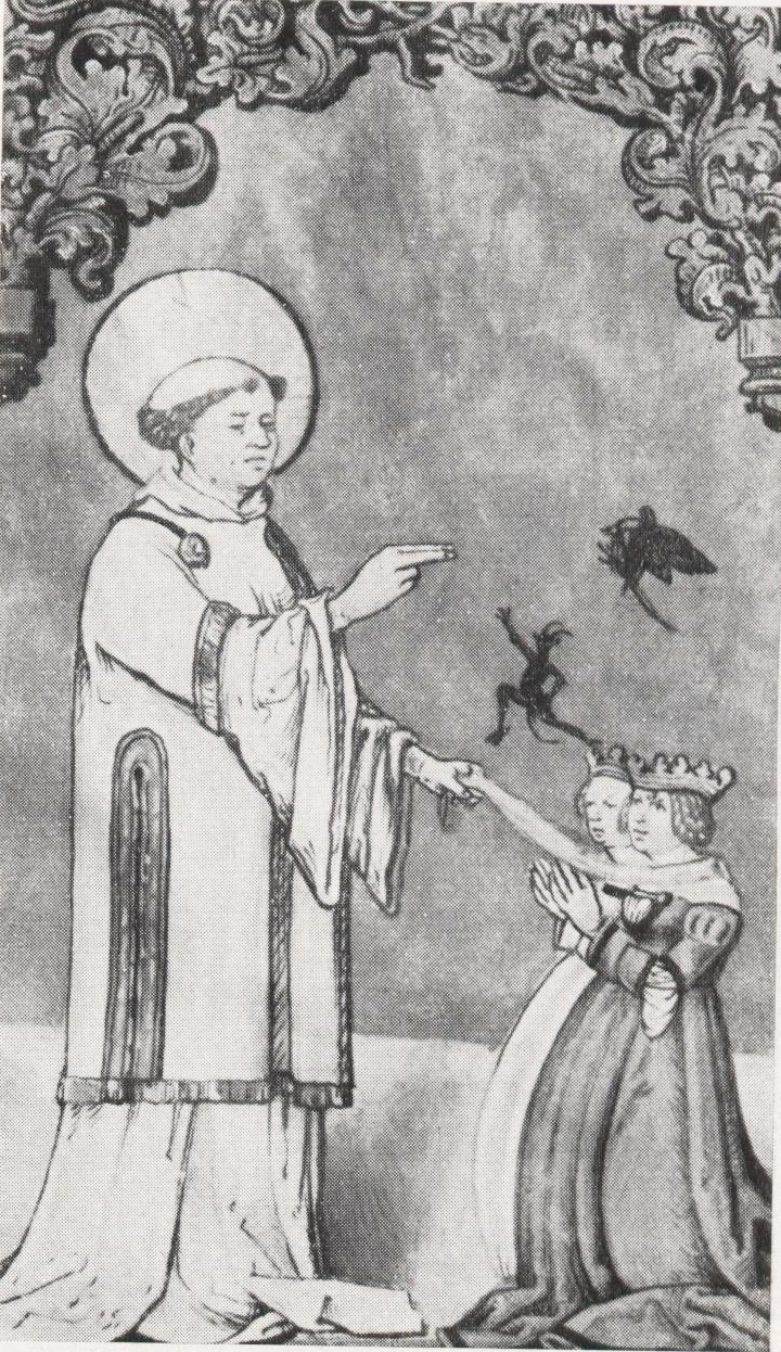 St. Cyriakus heilt die Königstochter, aus dem Statutenbuch des Cyriakusstiftes Worms-Neuhausen.